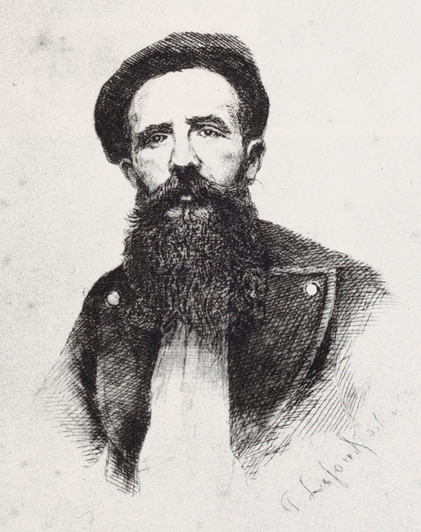 Dessin représentant Simin Palay.